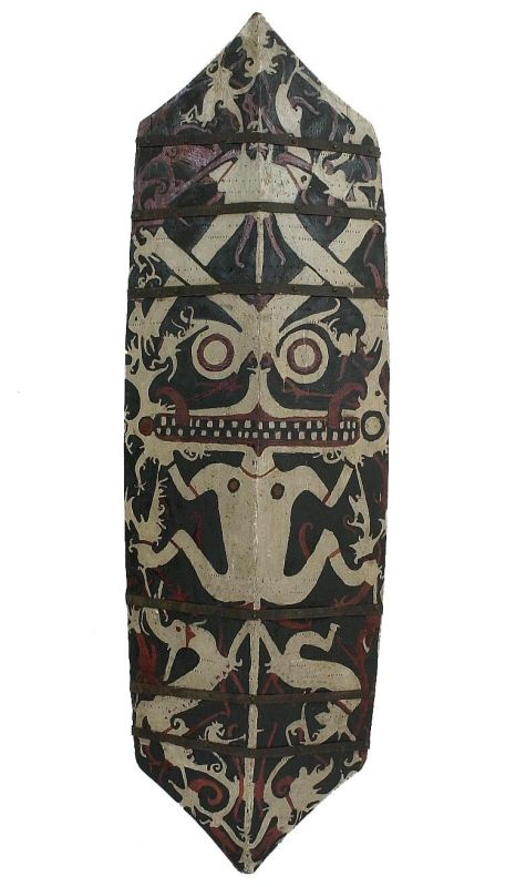 Schild. Houten schild met mens- en dierfiguren Unknown language: Talawang, kalabit